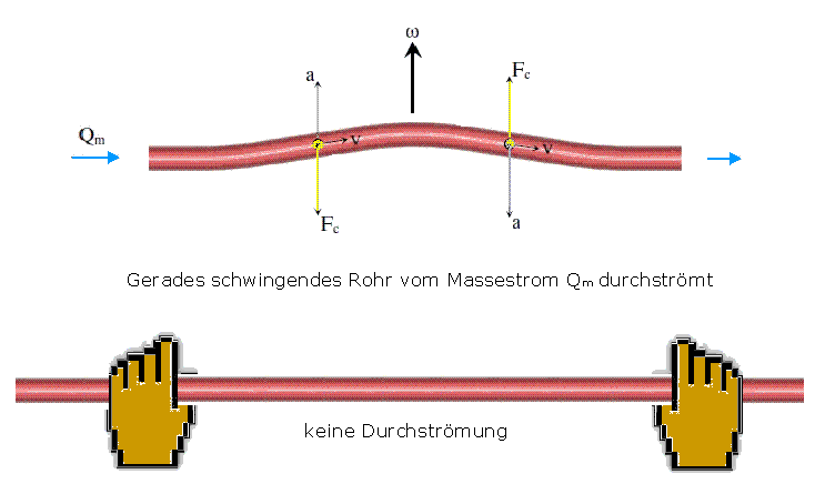 Gartenschlauch Effekt von Corioliskraft am Einrohrprinzip